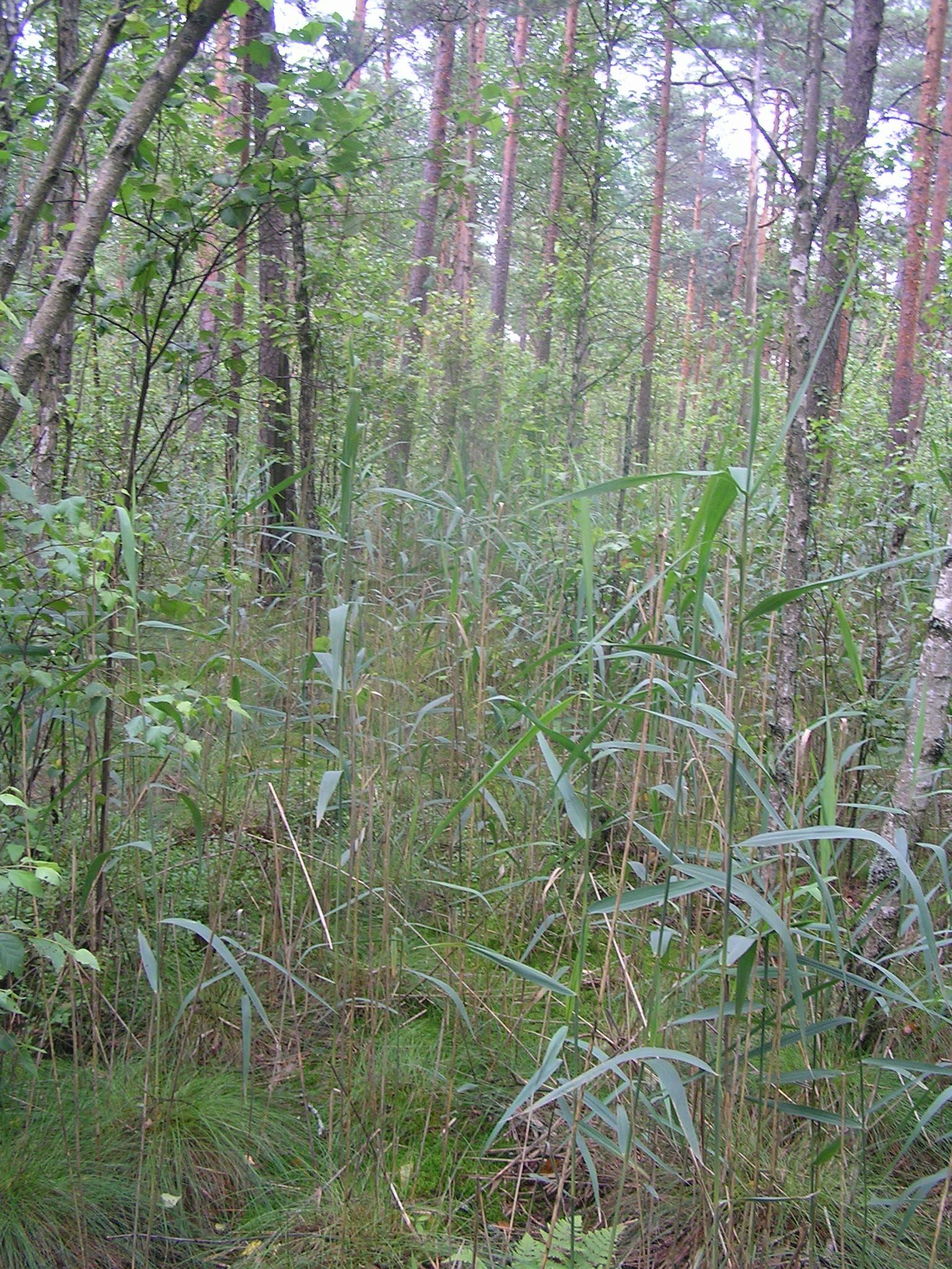 Sosnowo-brzozowy las bagienny Thelypteridi-Betuletum pubescentis, z drzewostanem złożonym z brzozy omszonej z domieszką sosny, z występującą trzciną pospolitą w rezerwacie Jesionowe Góry